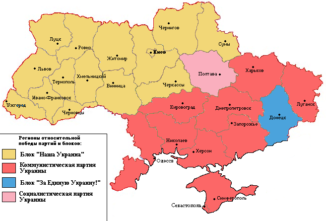 Результаты парламентских выборов на Украине (2002)